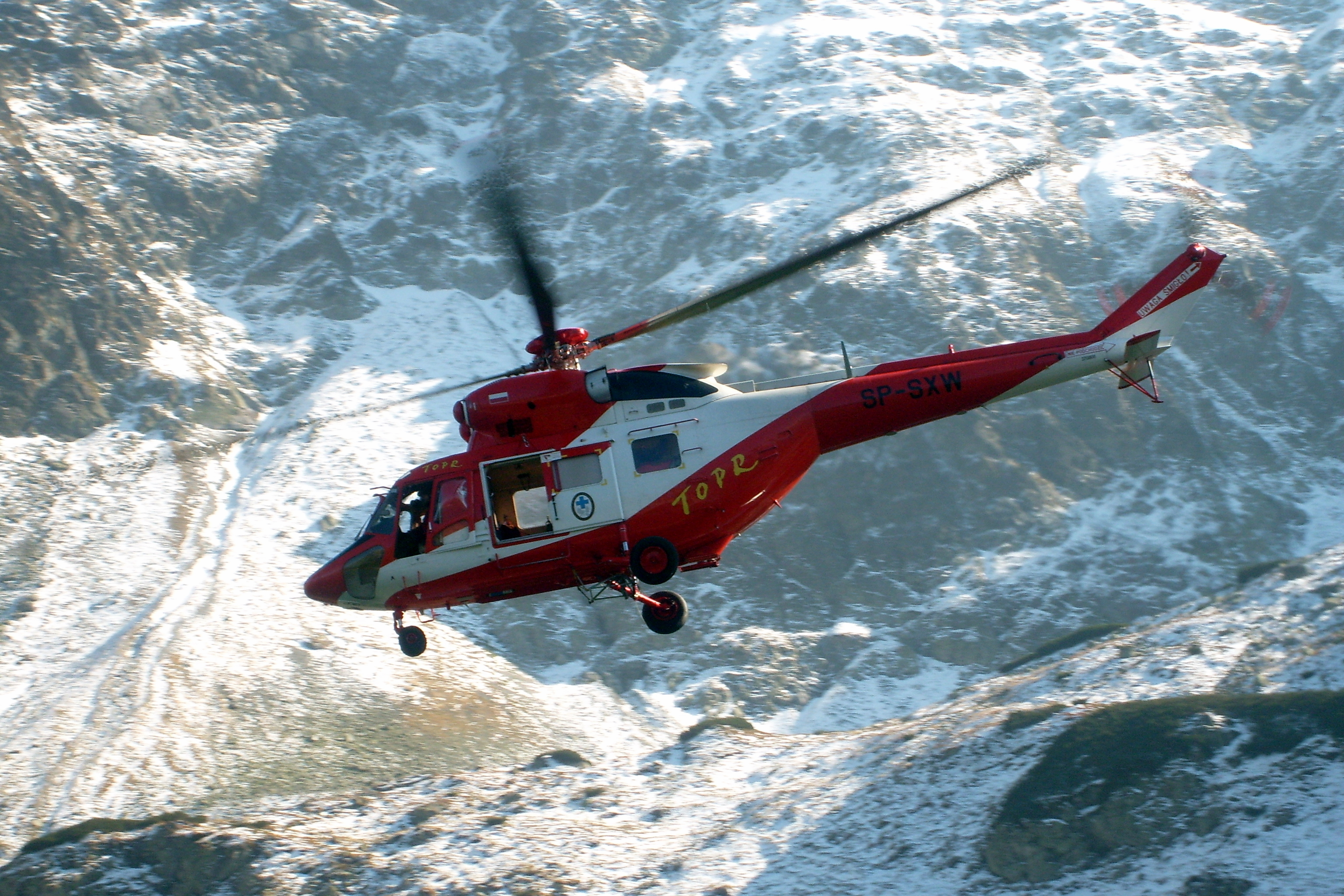 SP-SXW - Sokół SP-SXW Tatrzańskiego Ochotniczego Pogotowia Ratunkowego